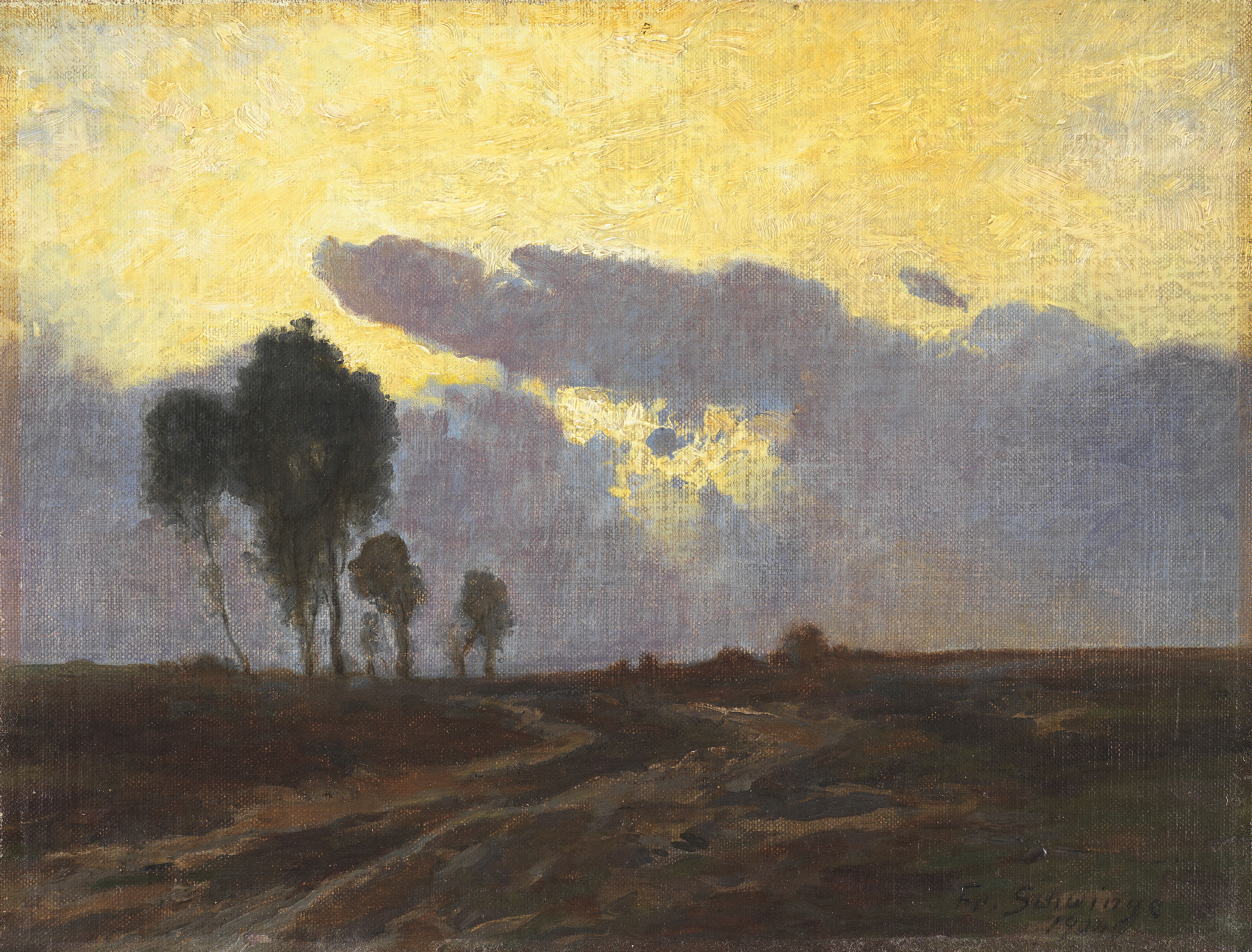 Friedrich Schwinge: Abendstimmung auch Abendstimmung in der Heide, 1902 (laut Ketterer Kunst) oder 1904 (evtl. laut Datierung unter der Signatur), 35 × 25, 5 cm, Öl auf Leinwand, auf Pappe aufgezogen. Verso betitelt mit Abendstimmung.